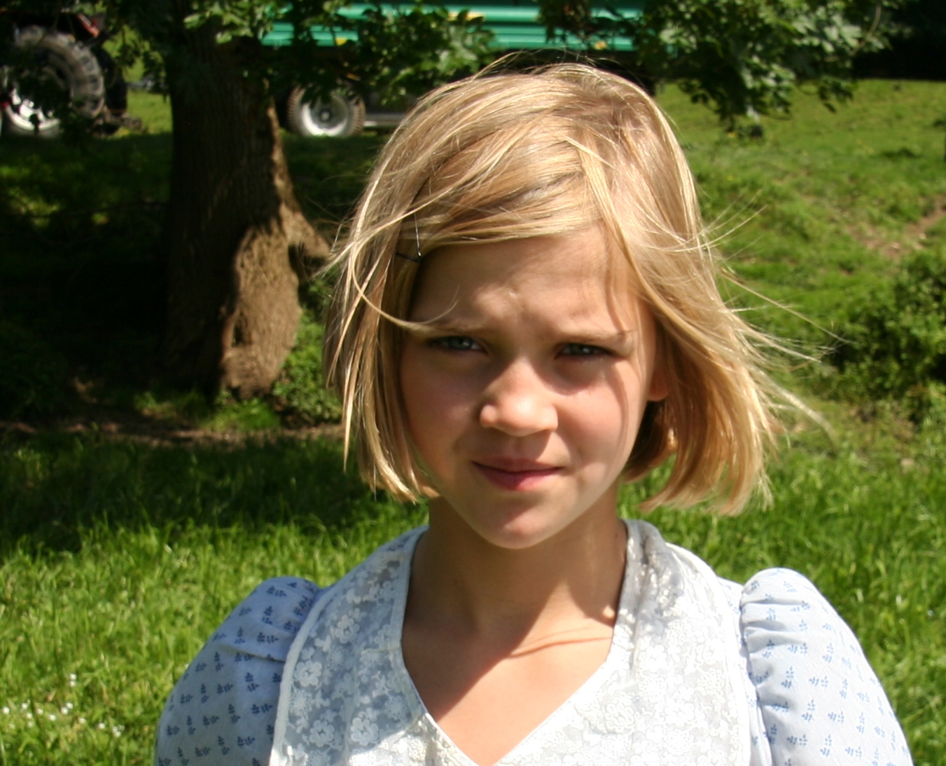 Nele Trebs im August 2011